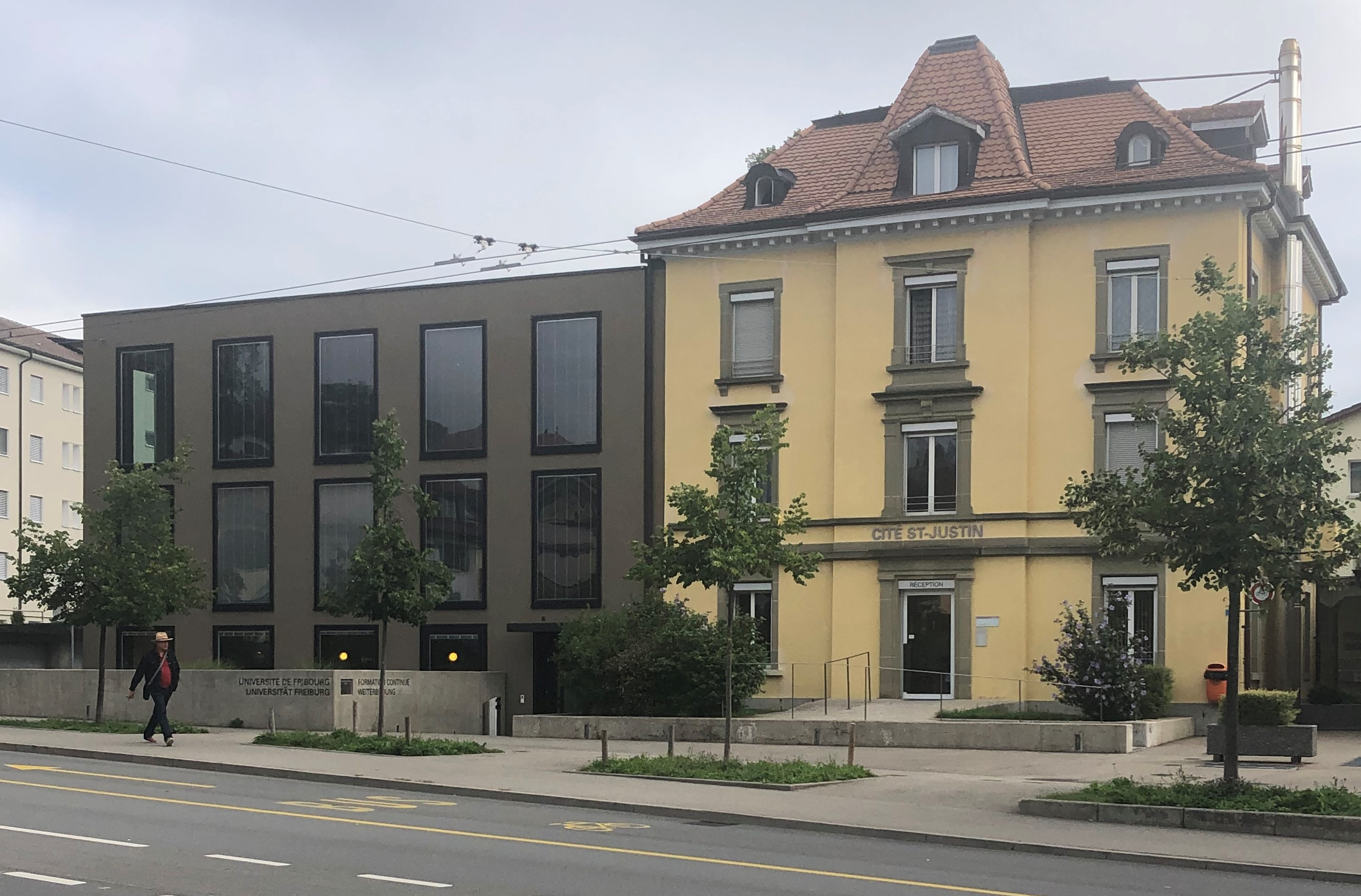 Universität Freiburg (Schweiz): Weiterbildungsstelle